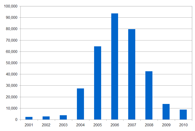 Liczba numerów PPS wydawanych Polakom w Irlandii w latach 2001-2010 na podstawie i